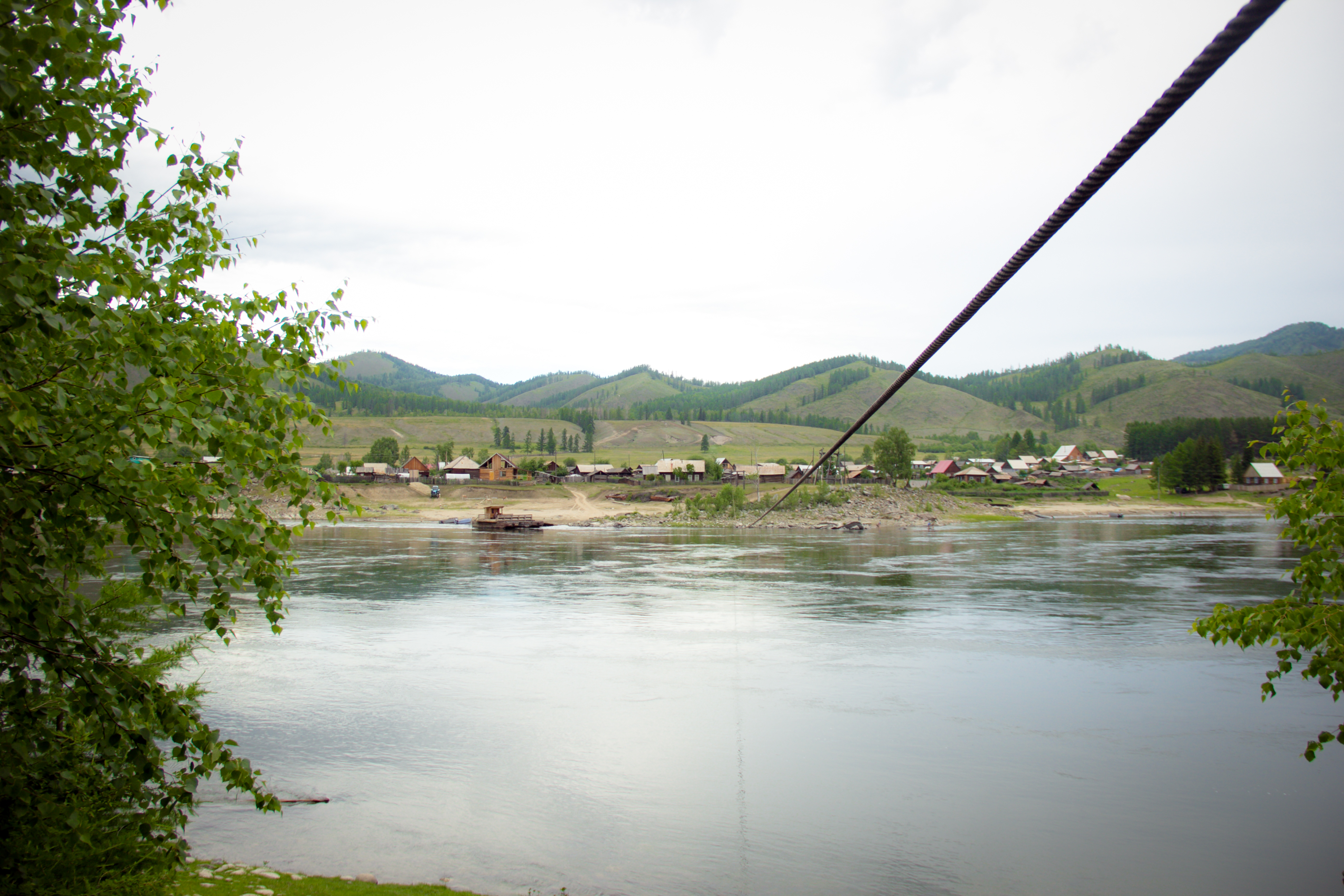 Каа-Хемский район РТ